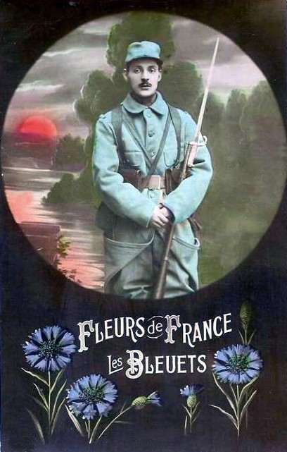 Carte postale ancienne Fleur de France, le Bleuet.